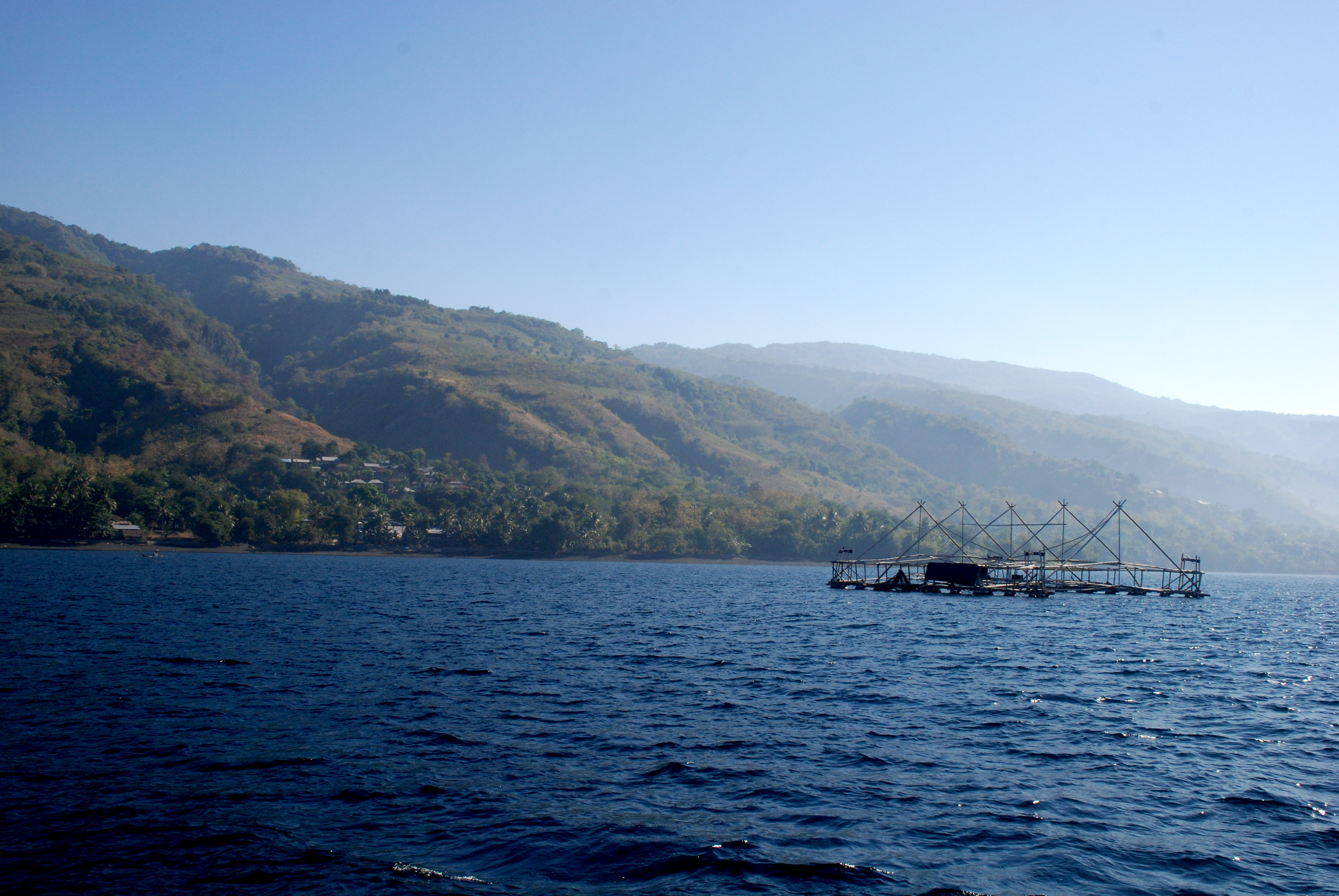 Bay of Kalabahi Alor Island